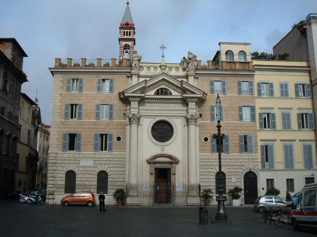 Chiesa di Santa Brigida, a Roma, nel rione Regola. Foto personale.